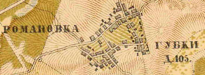 План деревни Романовка 1885 г.